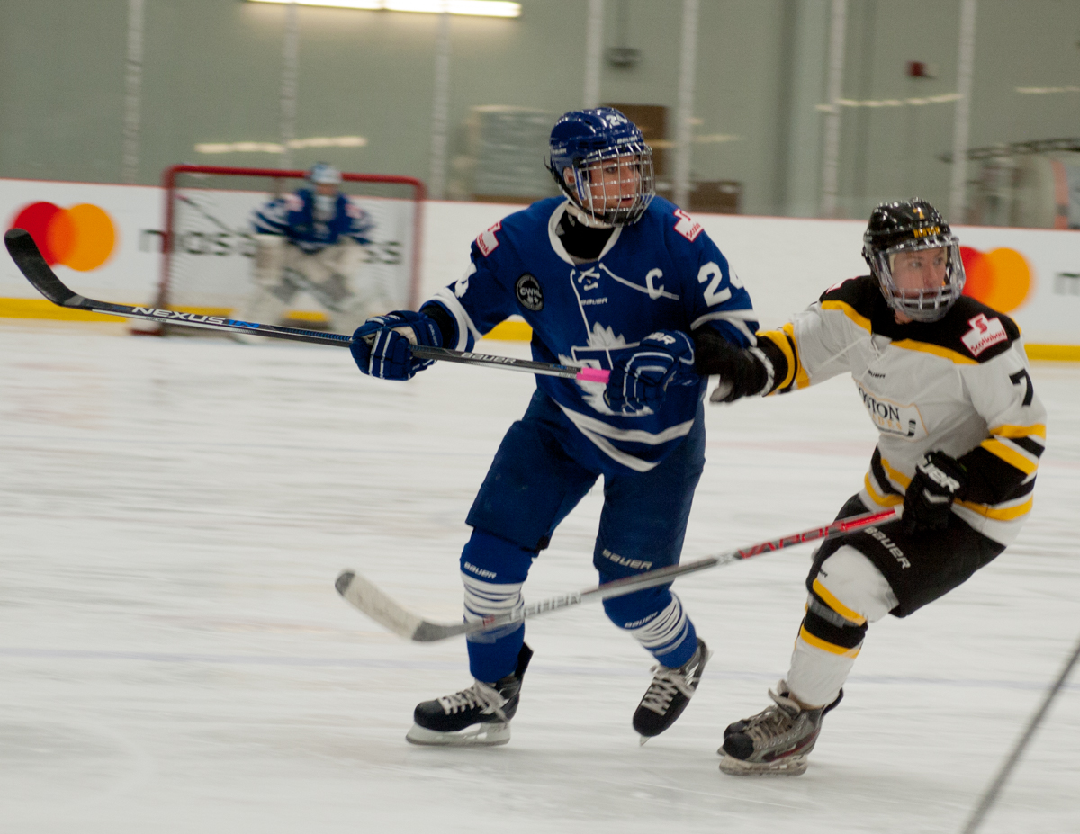 Natalie Spooner (T #24), Dru Burns (B #7)